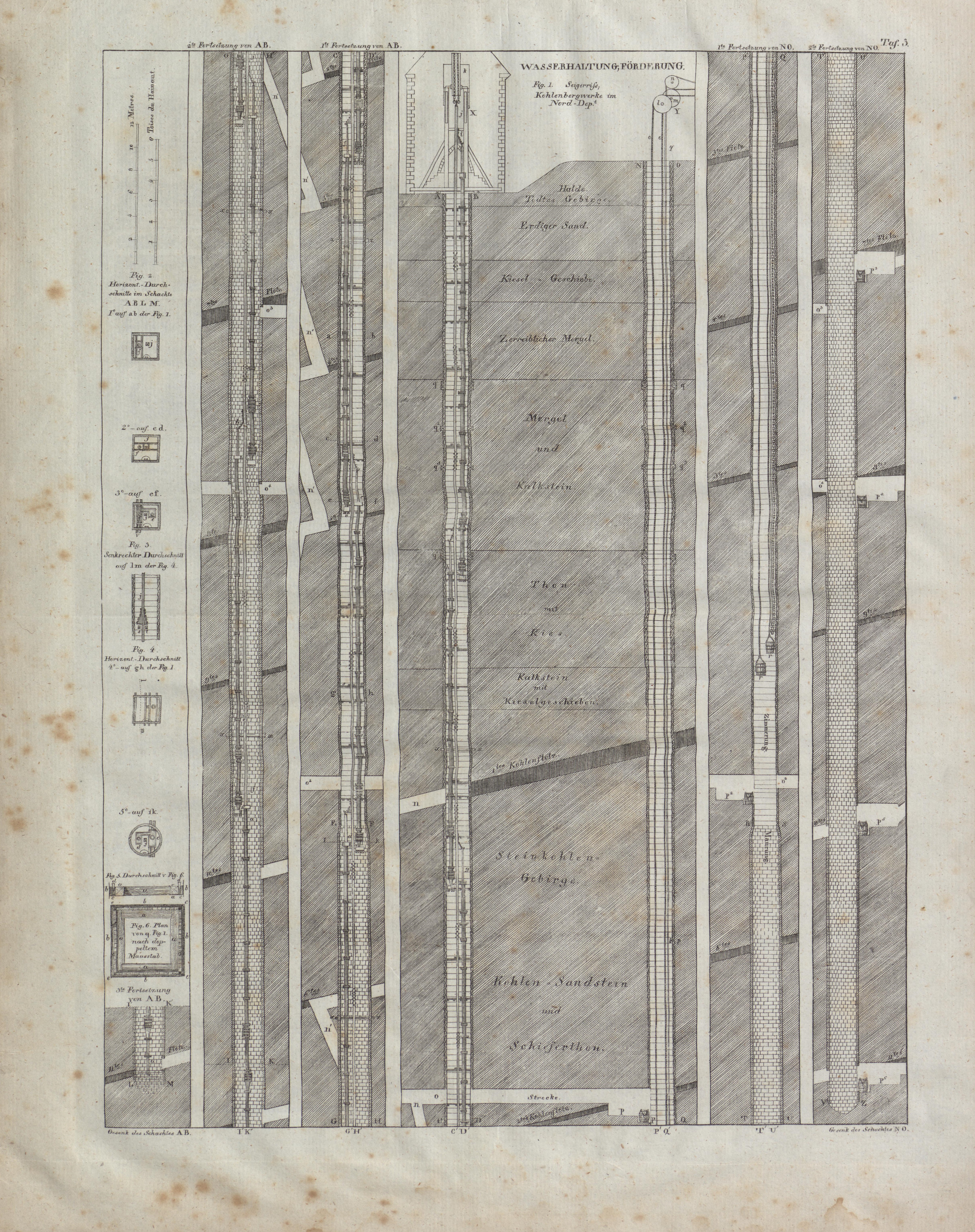 Abbildung aus: Atlas zu des Herrn von Villefosse Mineral-Reichthum